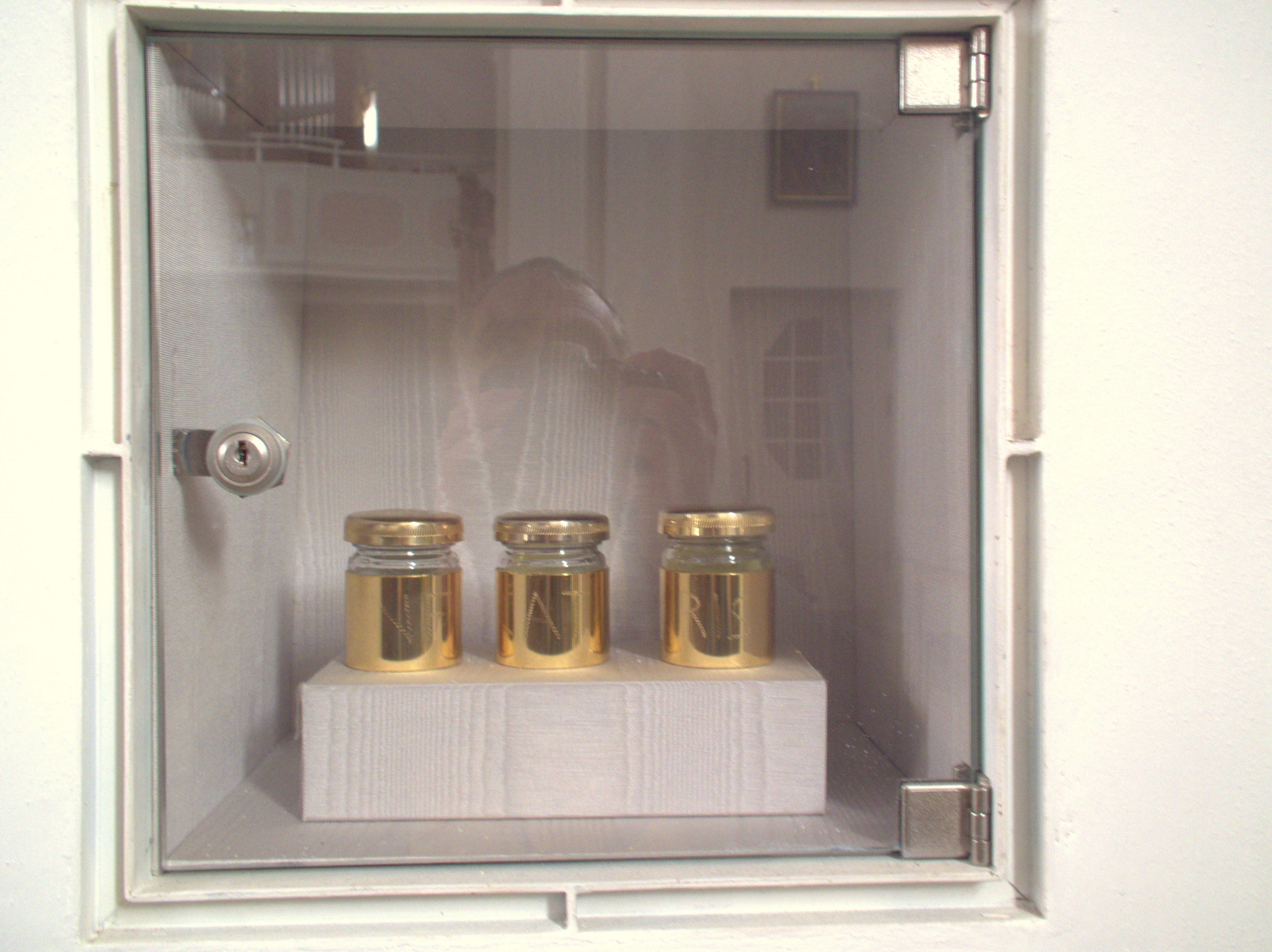 Pfarrkirche St. Andreas in Parsberg